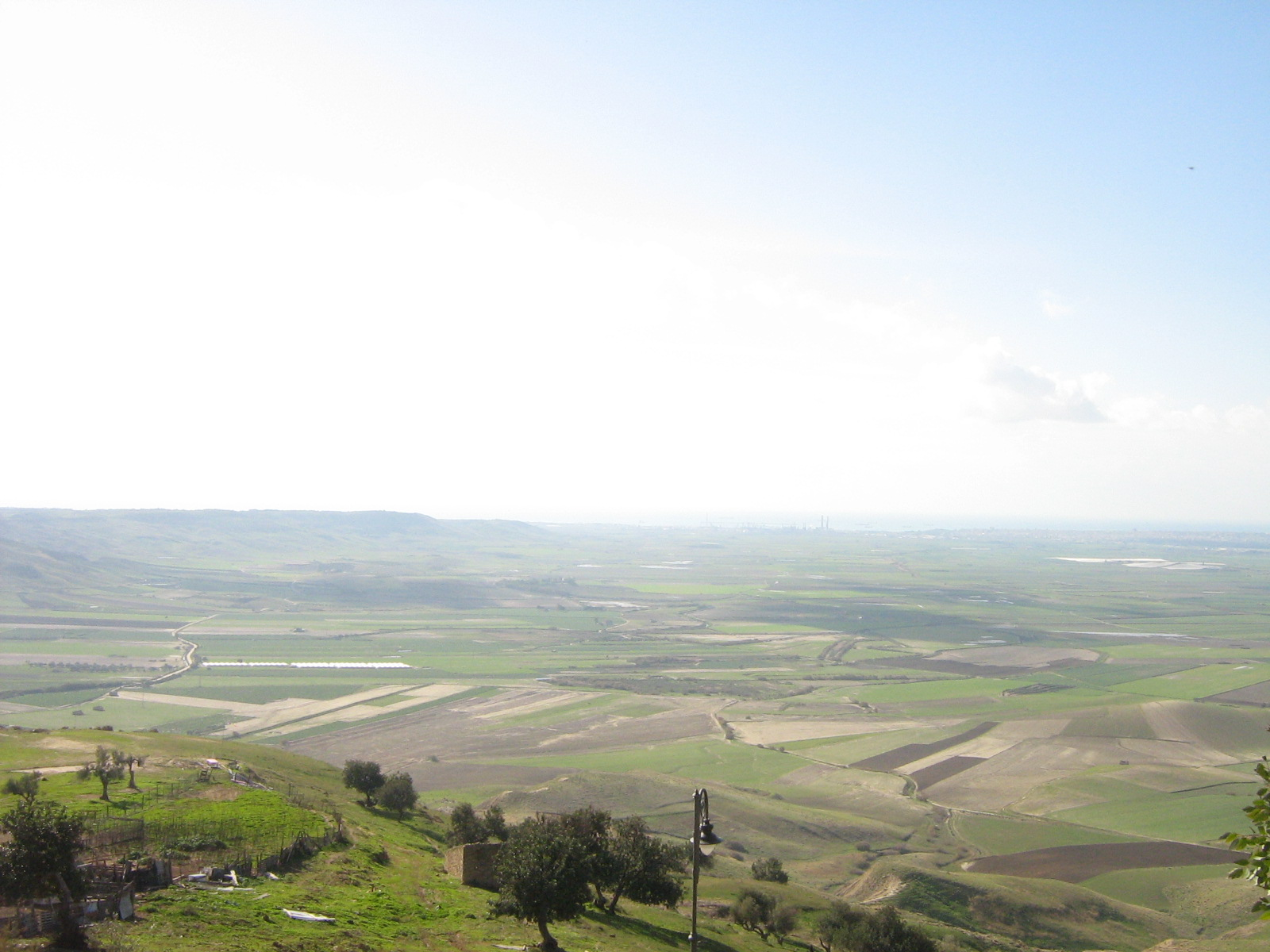 Pianda di Gela vista da Niscemi